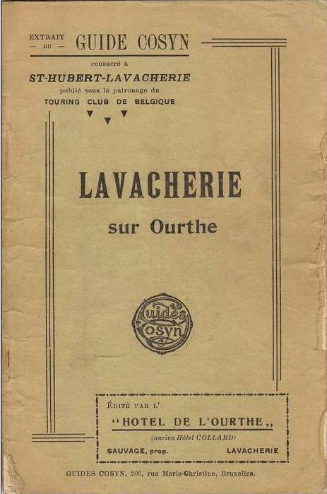 Couverture d'un Guide touristique de Lavacherie. Extrait du Guide Cosyn. publié par l'hôtelier Sauvage successeur de Collard à Lavacherie. Début XXè siècle.